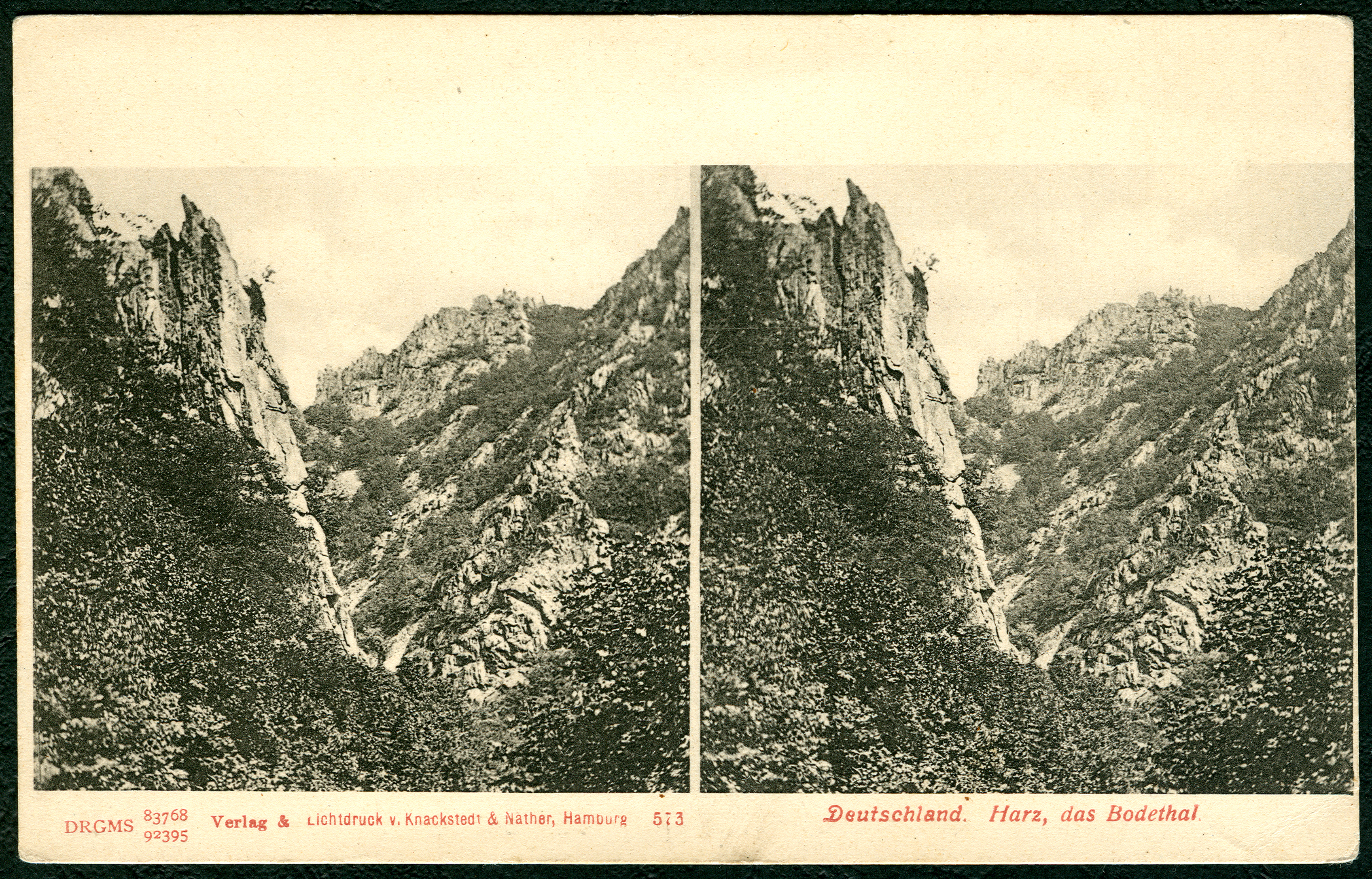 Stereoskopie der Firma Knackstedt & Näther mit der fortlaufenden Nummer 573, hier mit einem Blick um 1900 durch das Bodetal ...